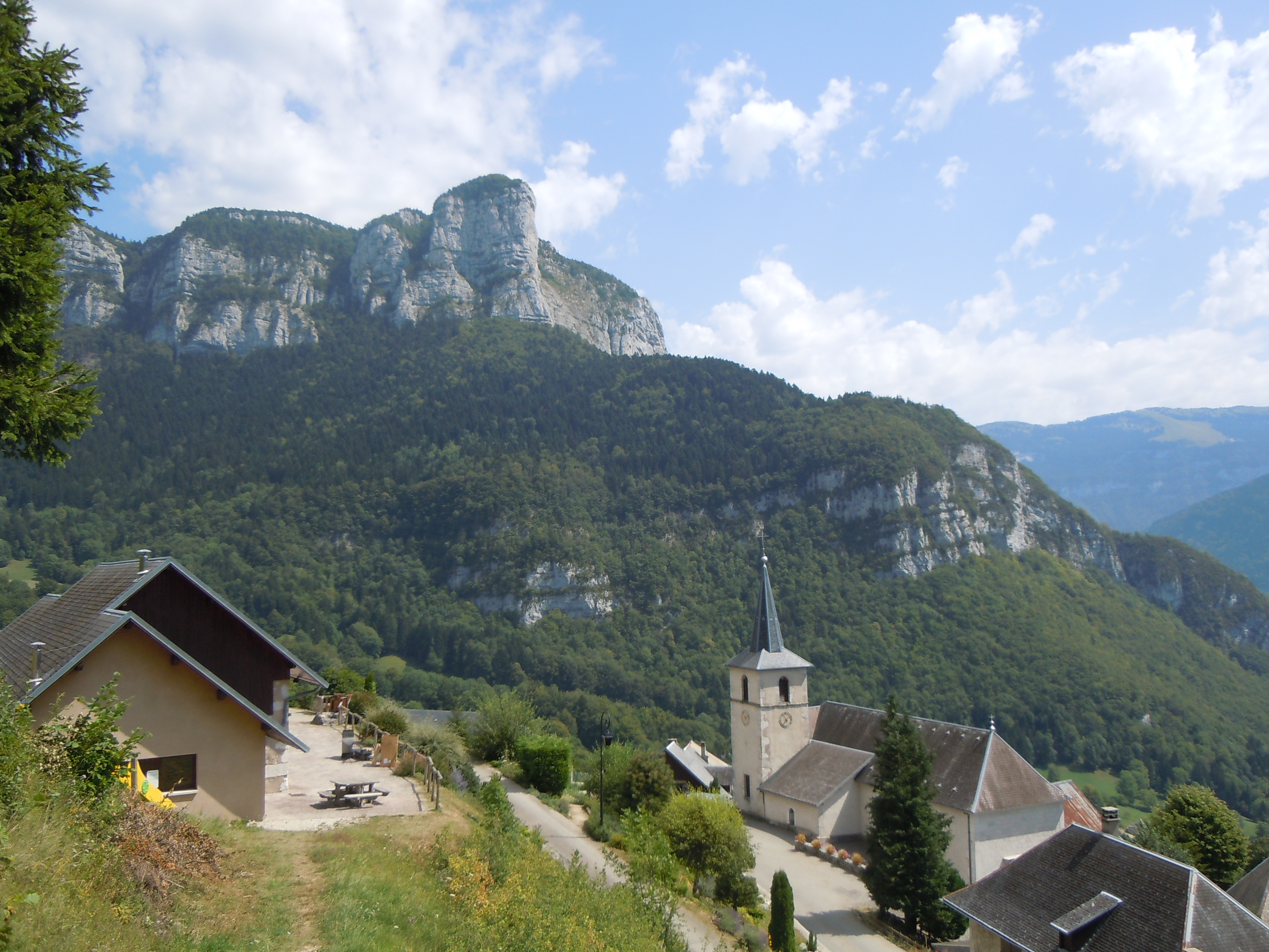 Corbel - Roche Veyrand